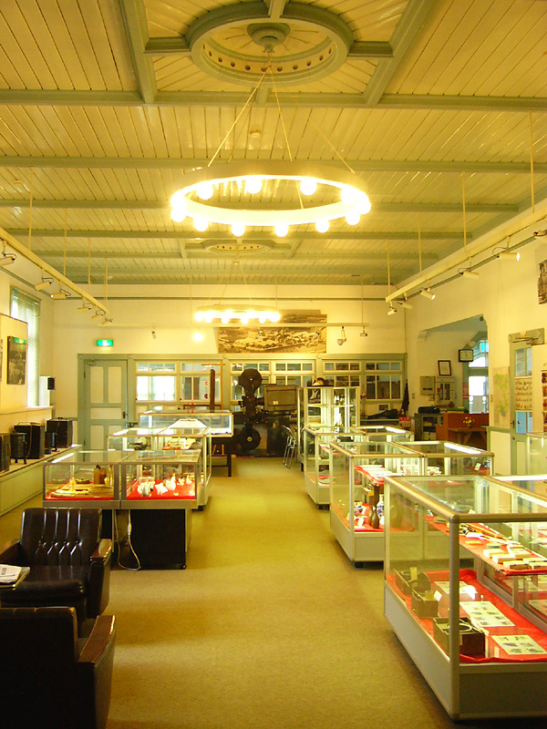 赤穂市立民俗資料館 IF写真・教科書等展示室